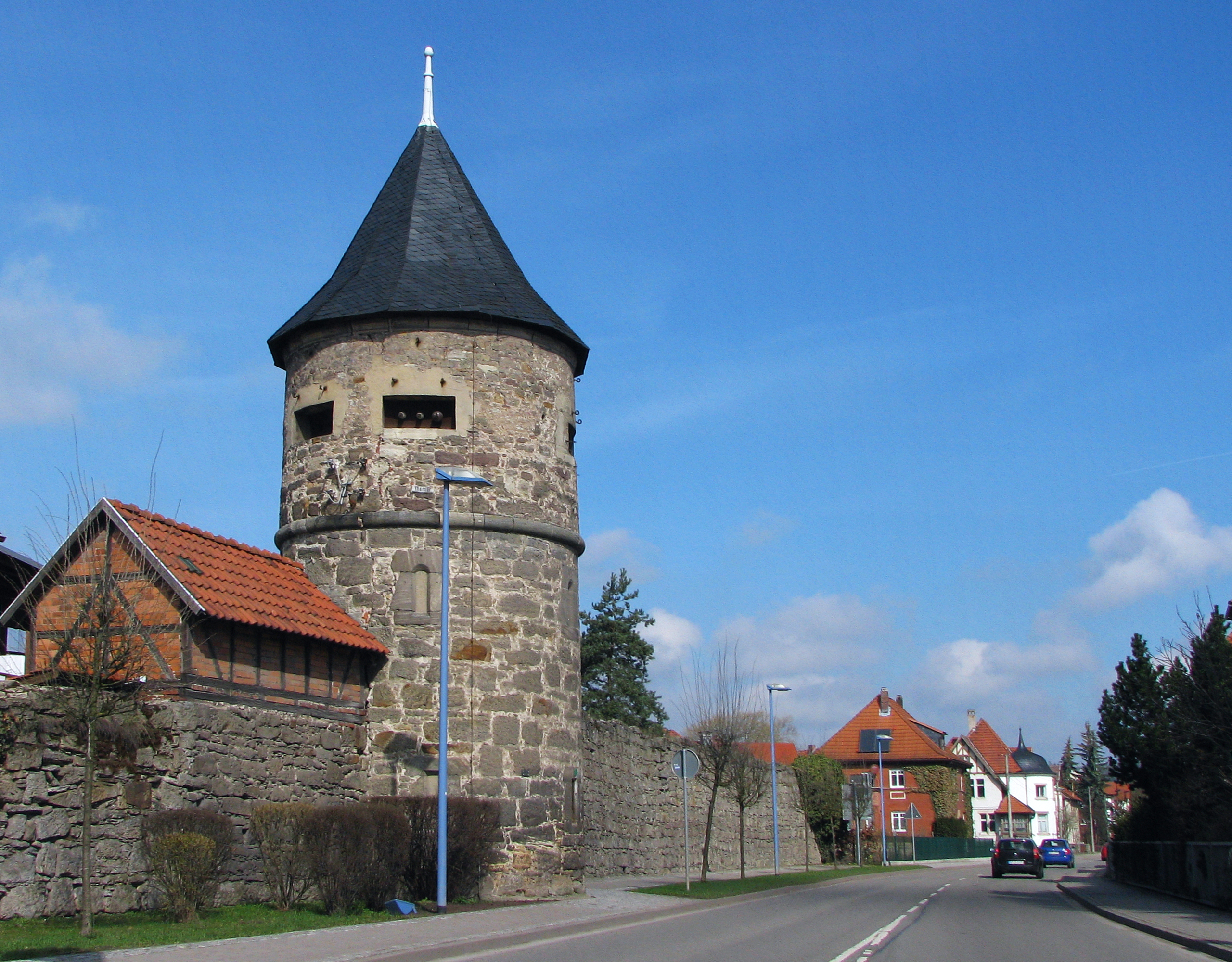 Themar in Thüringen: Oberer Turm mit Stadtmauer aus dem 15. Jahrhundert, etwa ab 1457. Foto Wolfgang Pehlemann IMG_2721